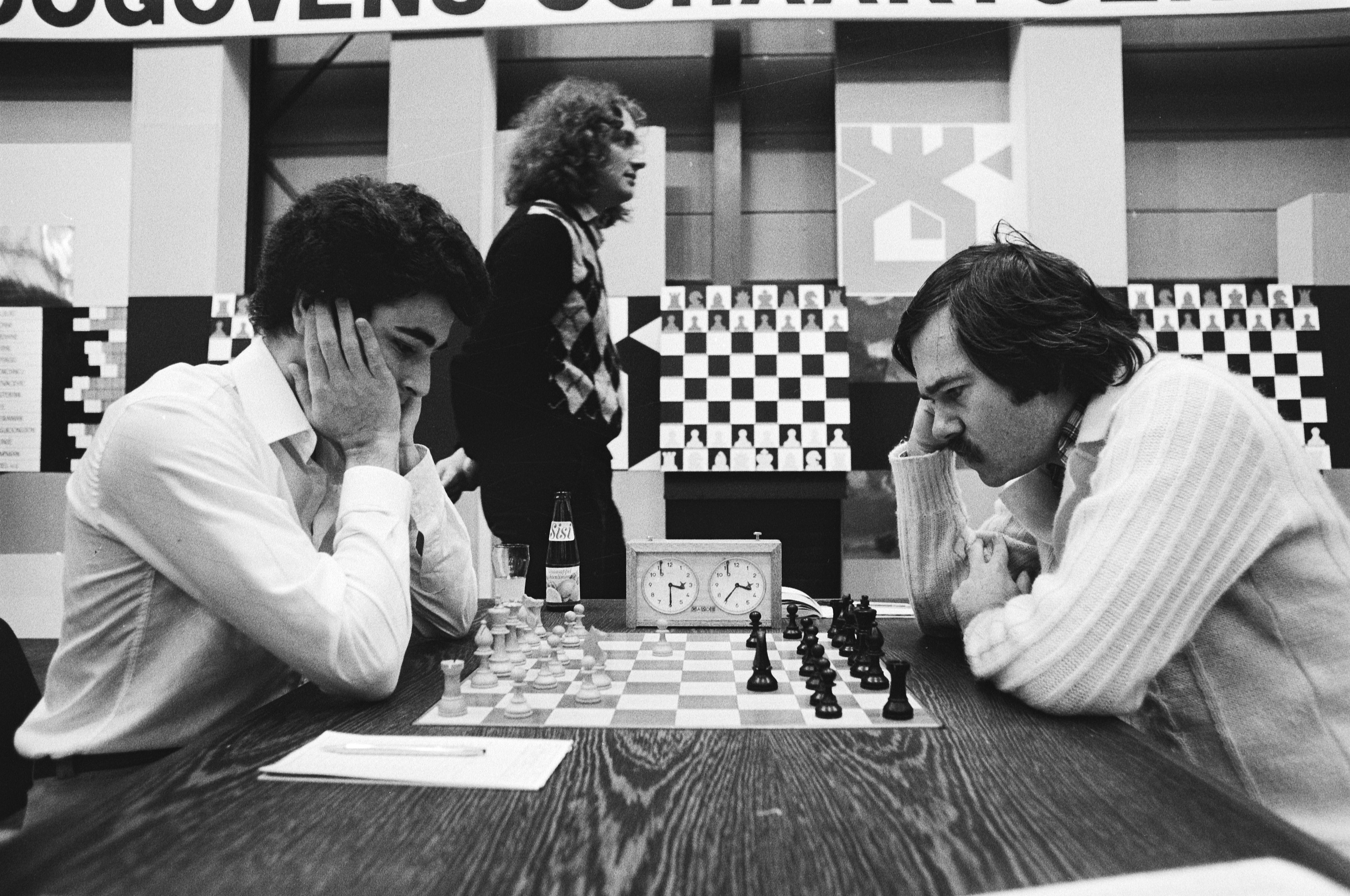 Collectie / Archief : Fotocollectie Anefo Reportage / Serie : [ onbekend ] Beschrijving : Hoogovenschaaktoernooi te Wijk aan Zee ; Seirawan (links speelt tegen Brown, Timman (midden) Datum : 29 januari 1980 Locatie : Noord-Holland, Wijk aan Zee Trefwoorden : schaken Instellingsnaam : Hoogovenschaaktoernooi Fotograaf : Croes, Rob C. / Anefo Auteursrechthebbende : Nationaal Archief Materiaalsoort : Negatief (zwart/wit) Nummer archiefinventaris : bekijk toegang 2.24.01.05 Bestanddeelnummer : 930-6458